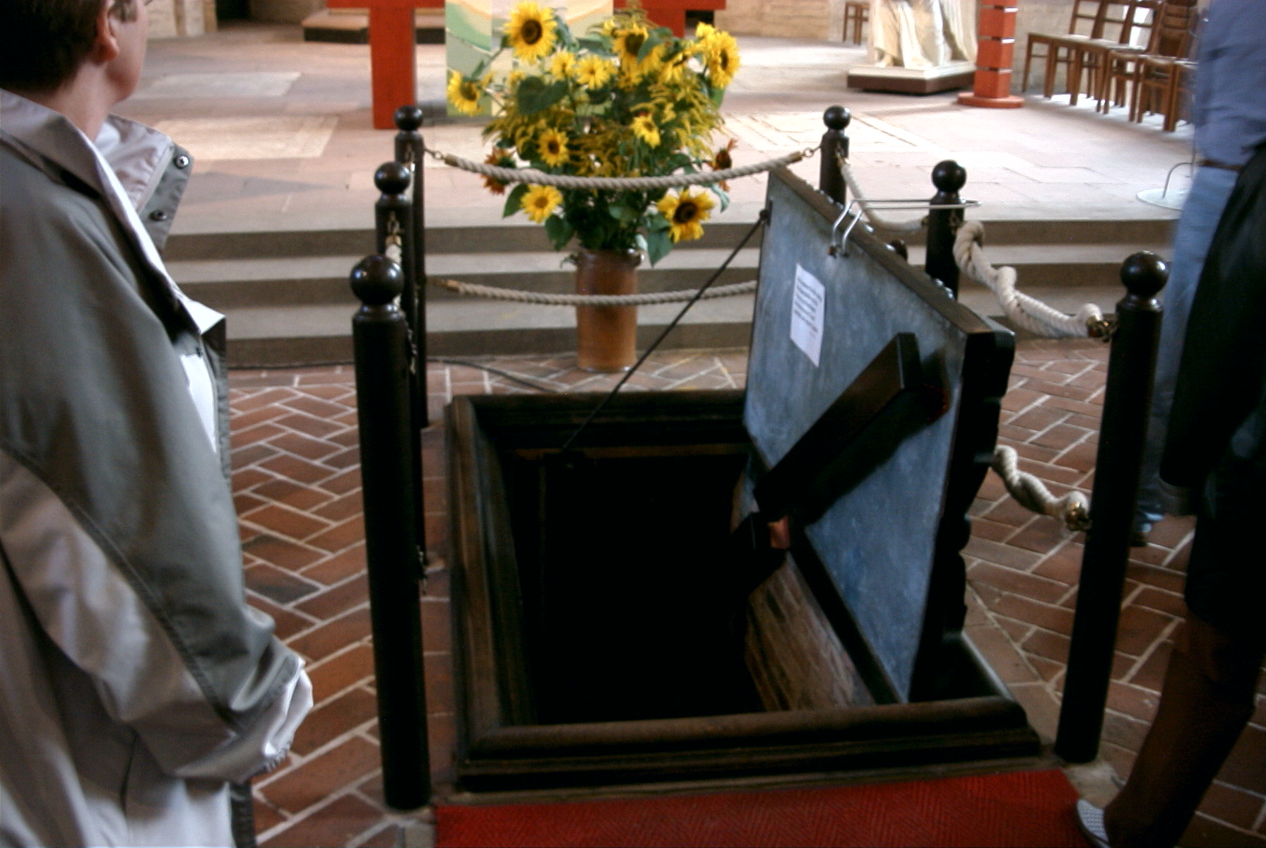 Eingang zur Herzogsgruft in der Kirche Wolgast